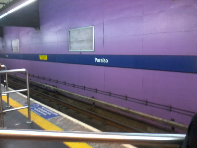 Plataforma da estação de Metrô Paraíso, em São Paulo